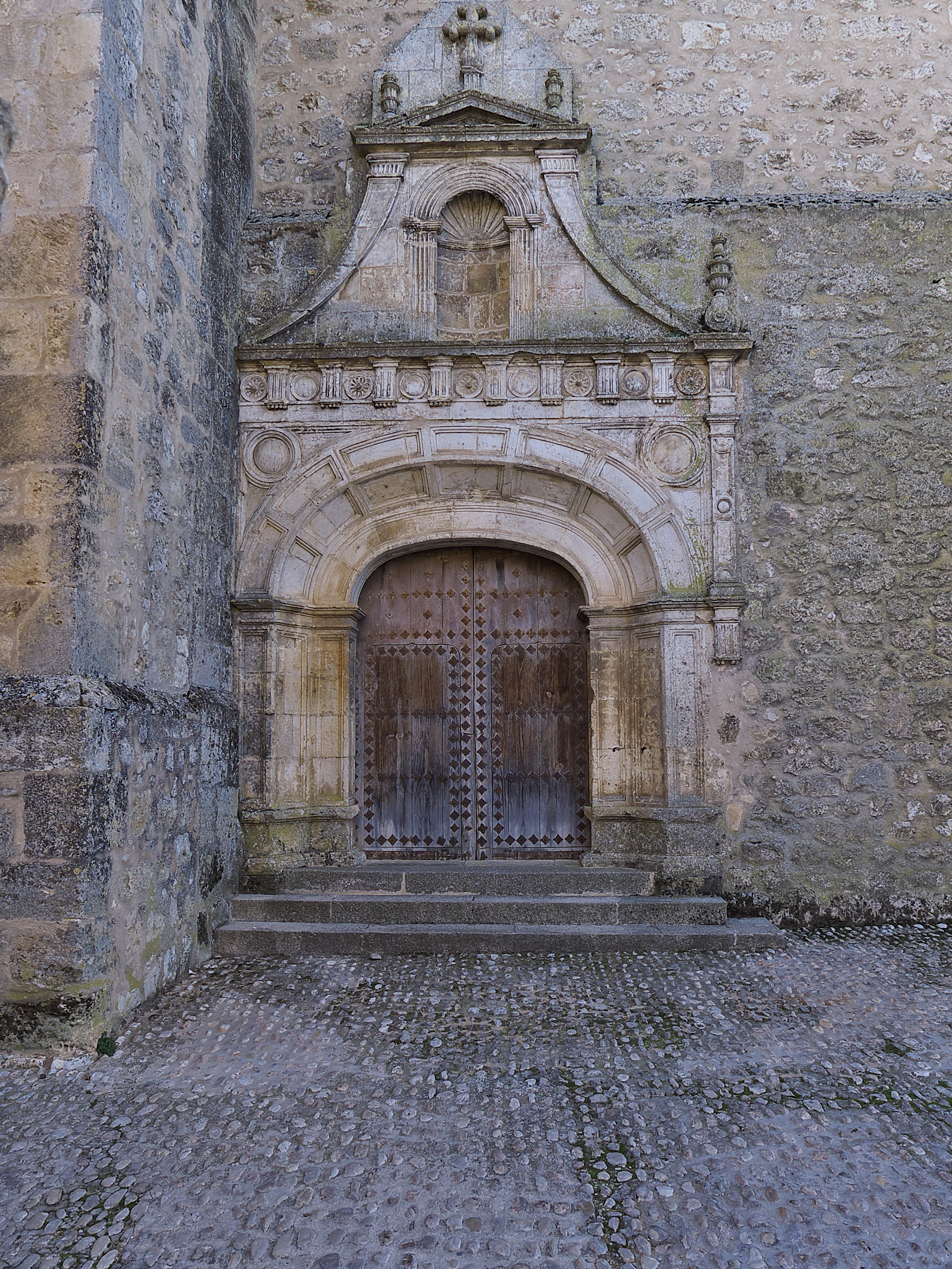 Portada septentrional (s. XVI)